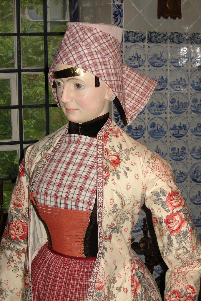 Bisschopkamer Fries Museum Hindelooper dracht